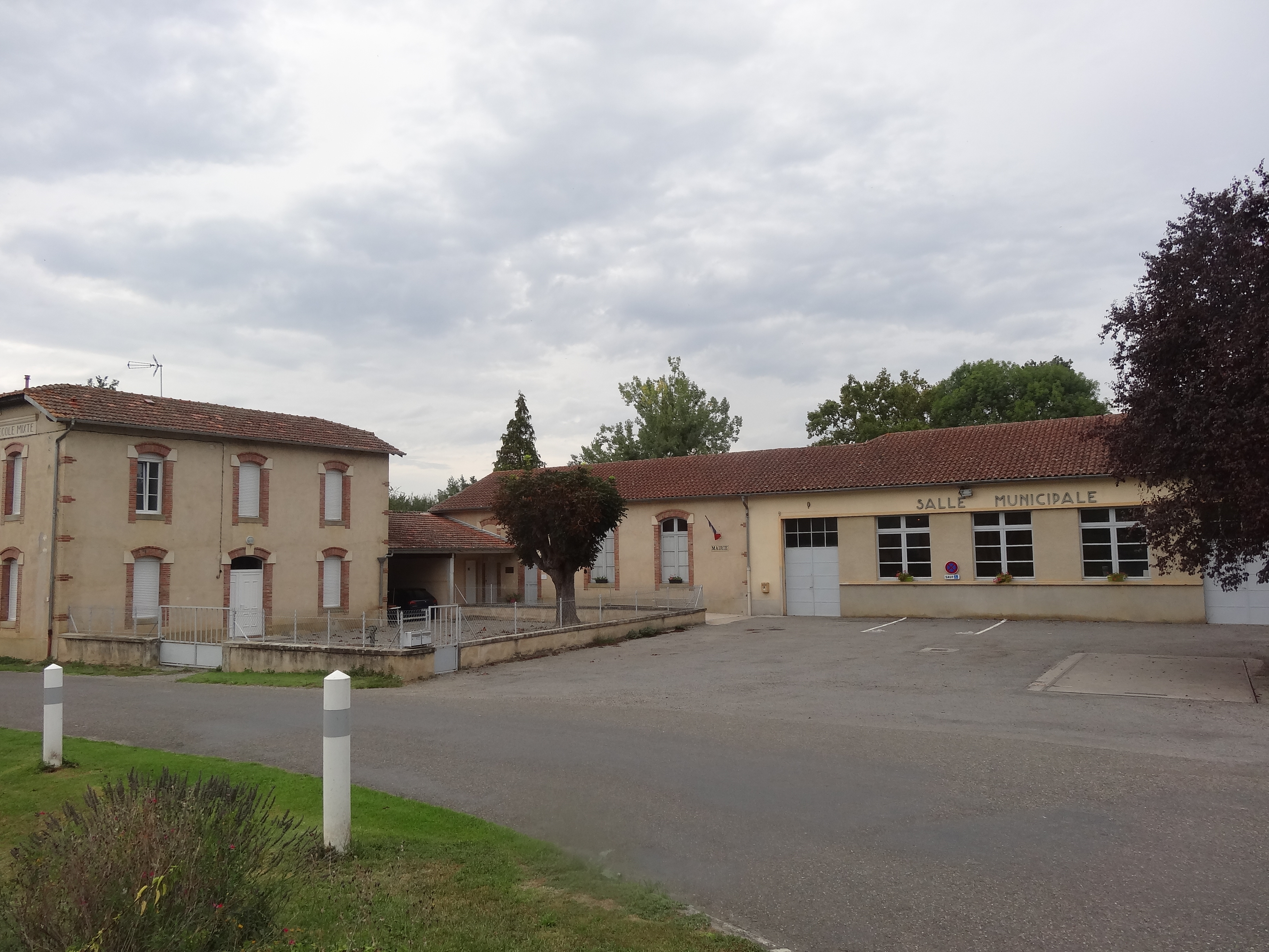 Mairie, salle municipale et ancienne école de Ponsan-Soubiran.